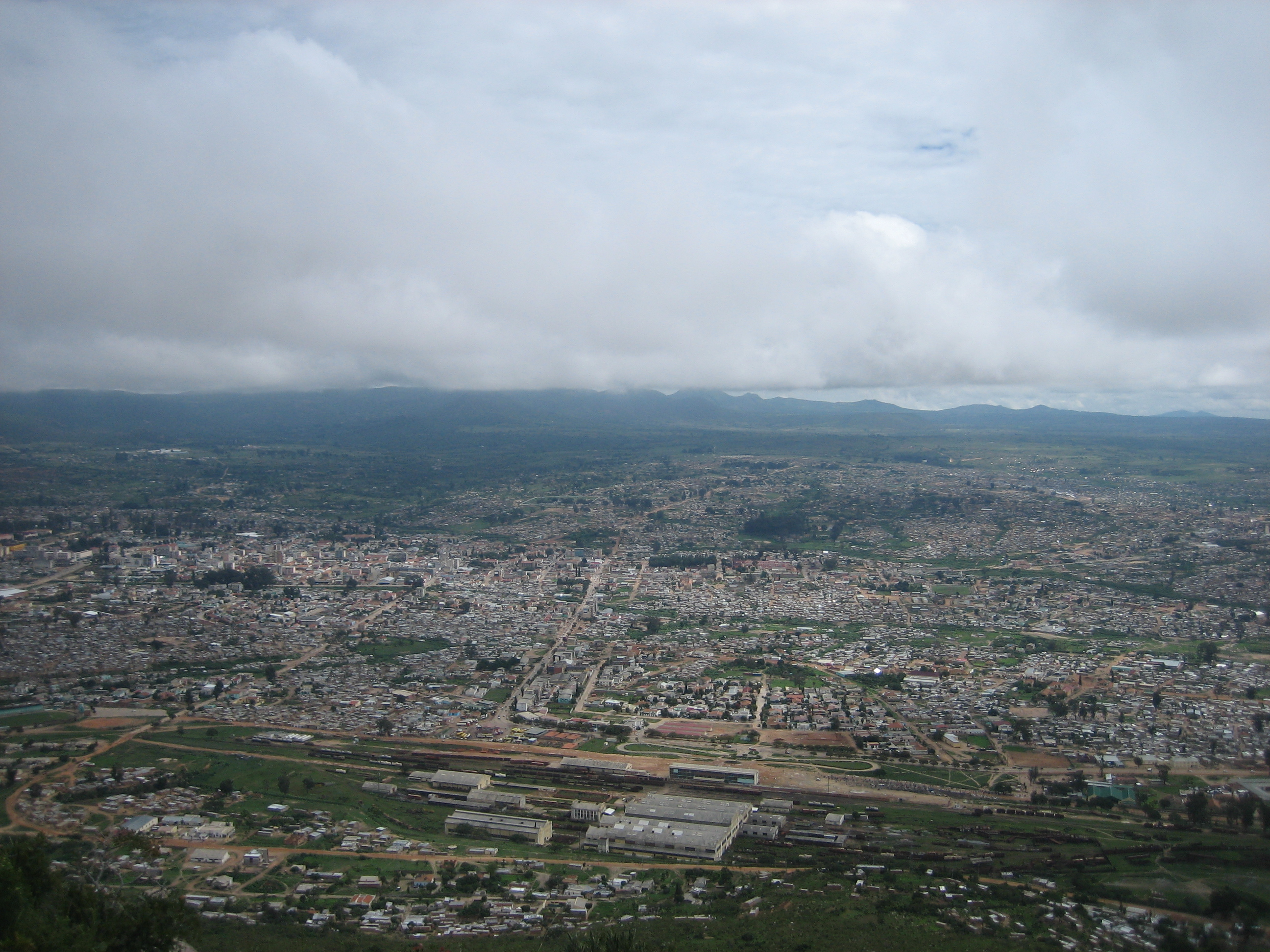 Vista da cidade de Lubango, Angola.